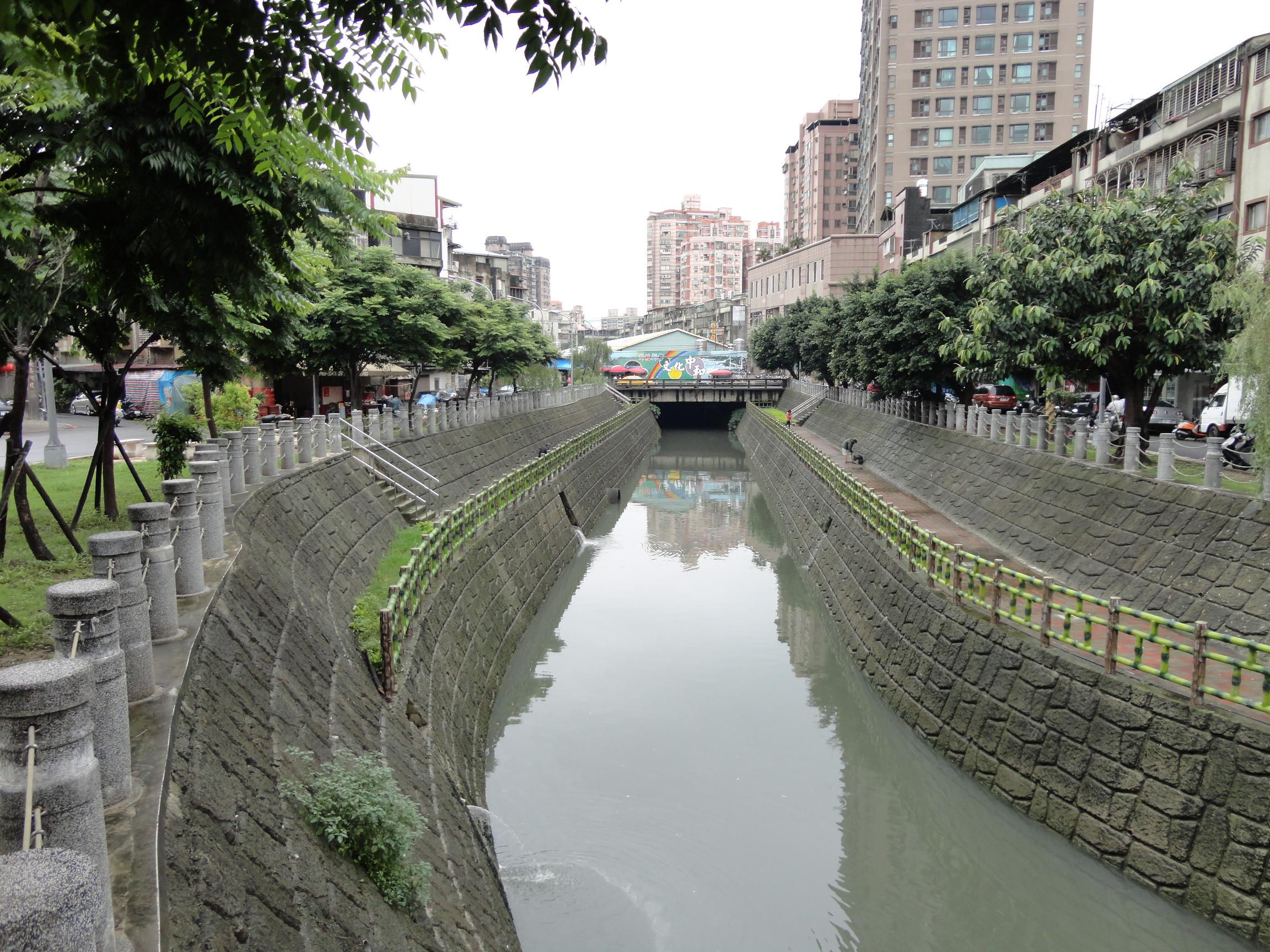 中文（台灣）: 新北市中和區廟子尾溝福祥橋到勝利橋段。